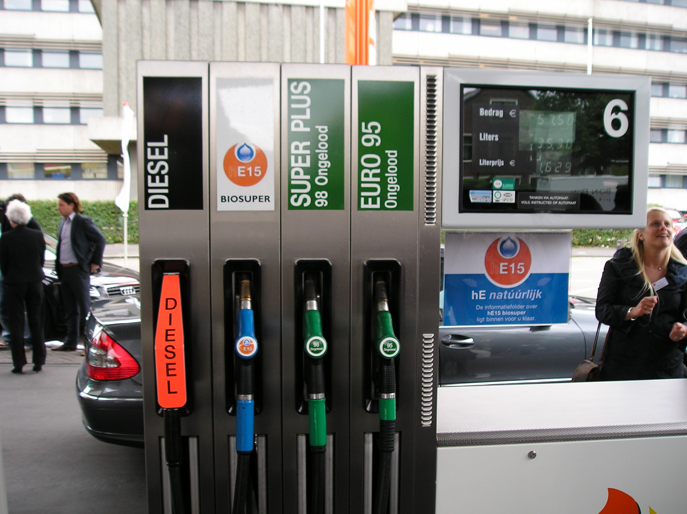 hE15 sinds 7 juli te verkrijgen in onder meer Voorburg